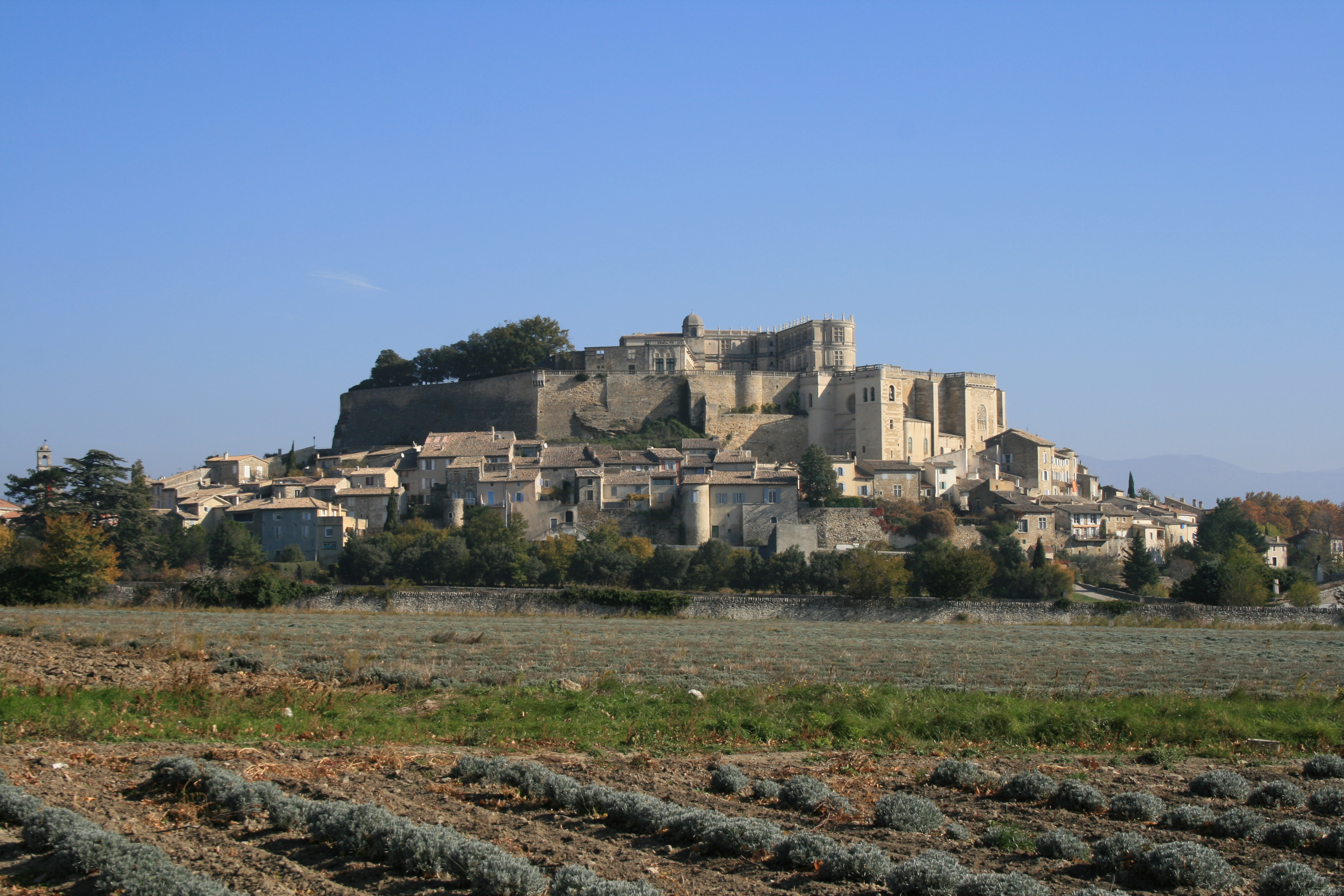 Die Ortschaft Grignan im Département Drôme, Frankreich